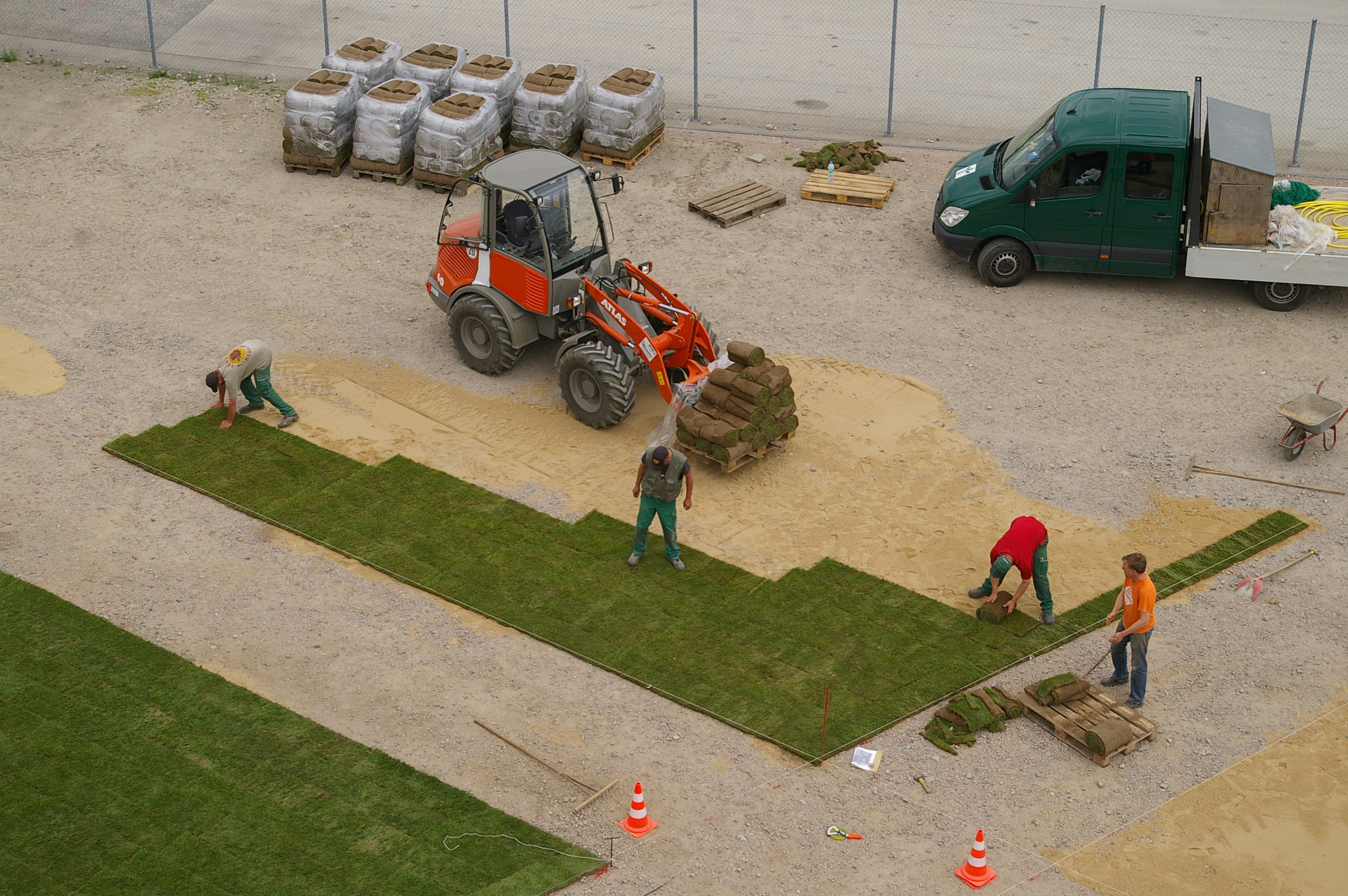 Verlegung von Rollrasen per Hand auf einer kleineren Fläche